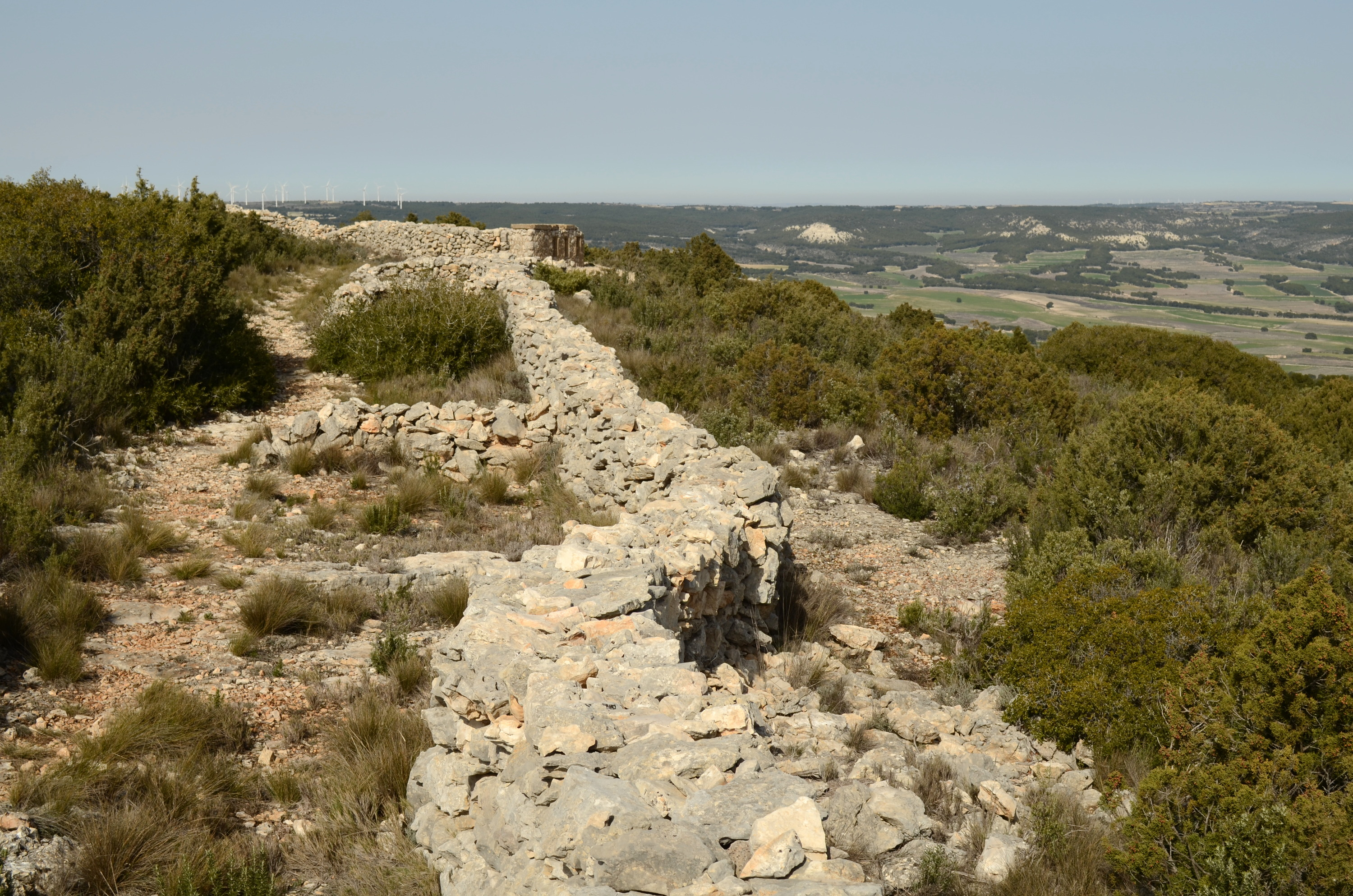 Vértice de Sierra Gorda (Fuendetodos, España). Parapeto corrido orientado al valle de Belchite. COnstruido entre 1836 y 1938.